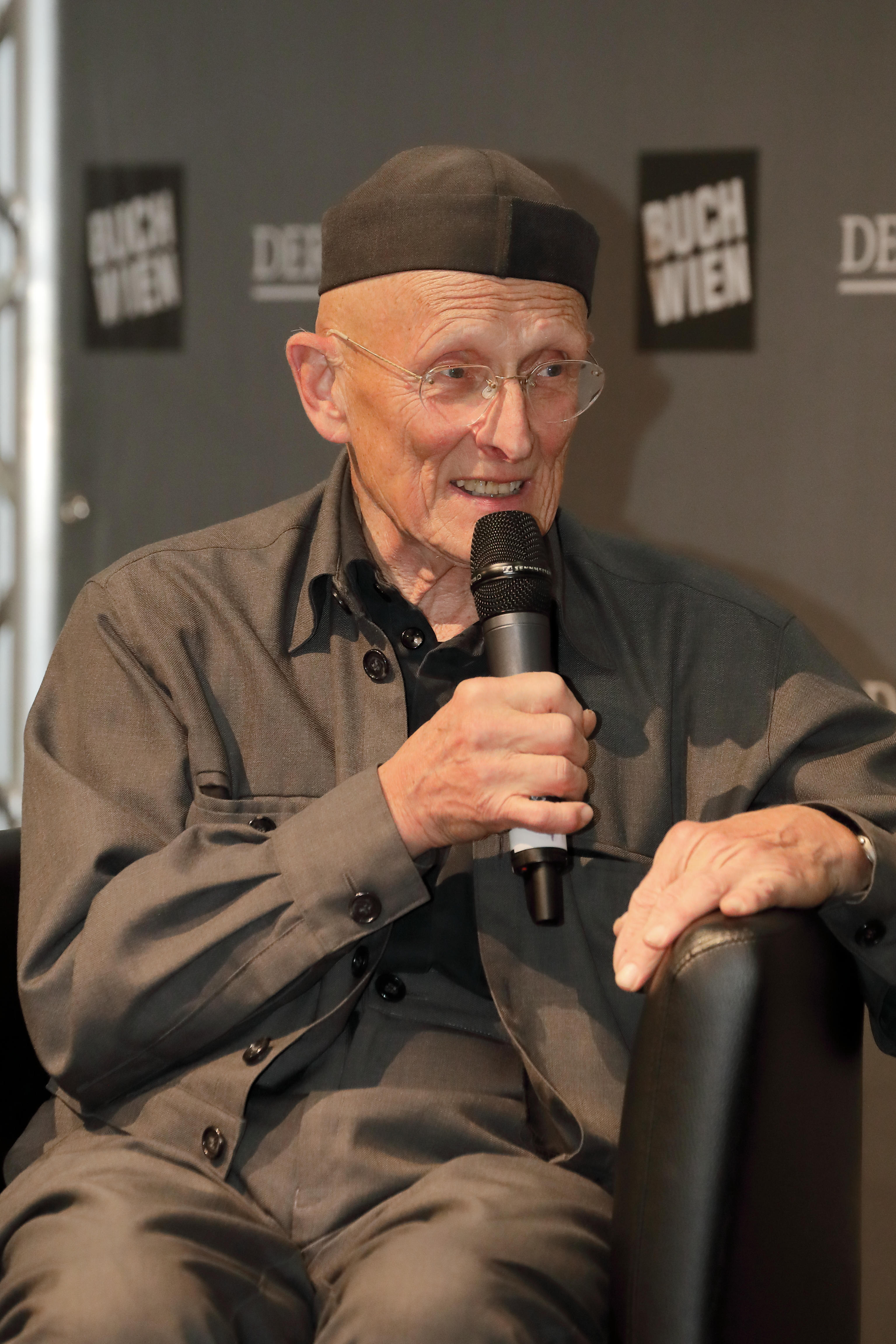 Der österreichische Schriftsteller Bodo Hell auf der Wiener Buchmesse 2019.